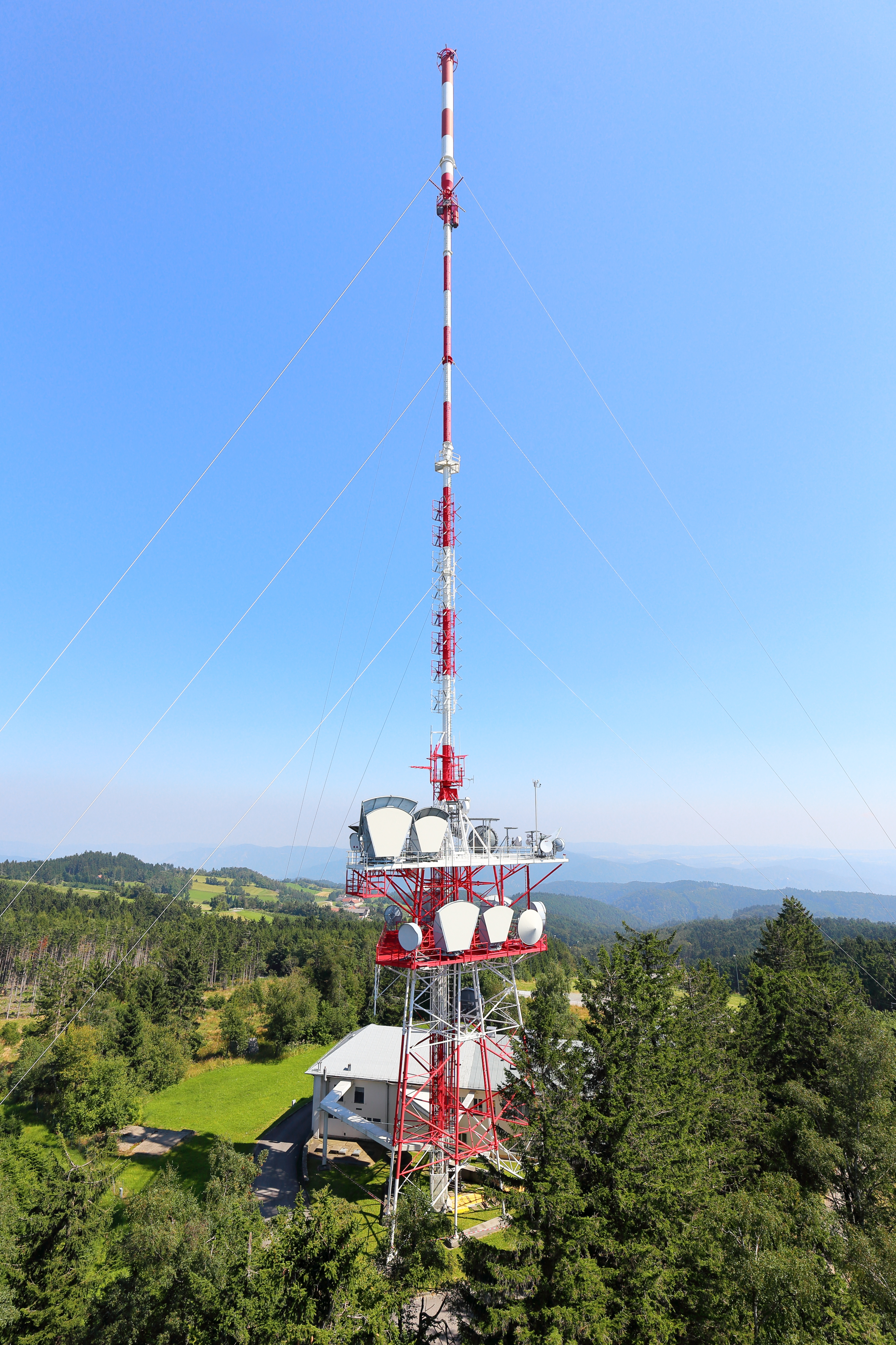 Blick von der 38 m hohen Jauerling-Aussichtswarte in Maria Laach am Jauerling, eine niederösterreichische Marktgemeinde in der Wachau, auf die Großsendeanlage St.Pölten-Jauerling. Die Sendeanlage auf 952 m Höhe, unmittelbar neben dem "Südgipfel" mit 960 m Höhe, wurde ab 1955 errichtet und 1958 offiziell eröffnet. Der 141 m hohe Sendemast ist dreifach in drei Ebenen abgespannt und in Hybridbauweise errichtet. Die unterste Ebene mit einer Höhe von rd. 35 m ist eine freistehende Gitterrohr-Mastkonstruktion mit 2 Plateaus. Darauf ist eine rund 80 m hohe Rohrmastkonstruktion und über dieser ein rd. 25 m hoher GFK-Antennenzylinder montiert.